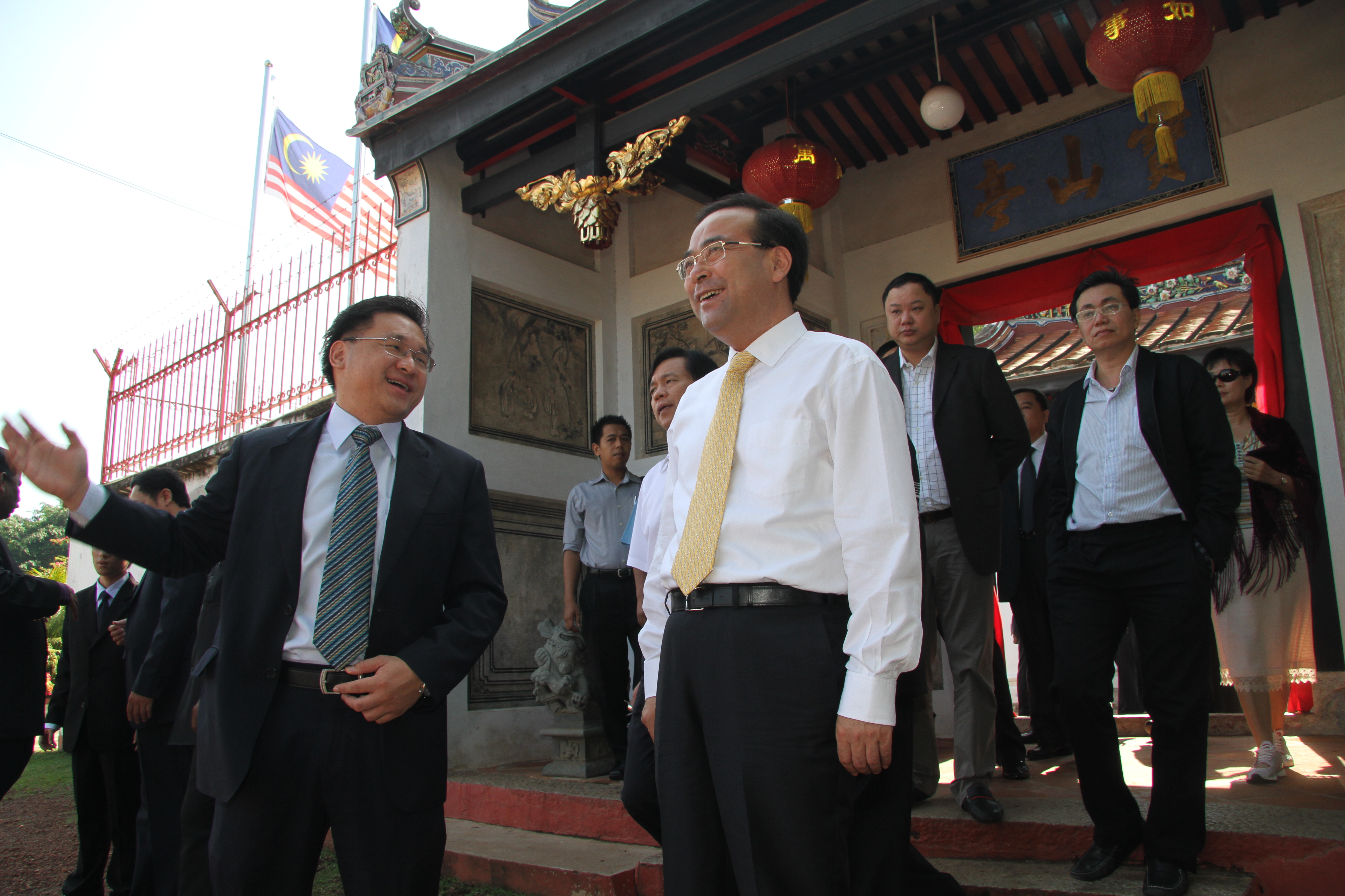 中文（中国大陆）: 孙政才访马六甲获颜天禄接待